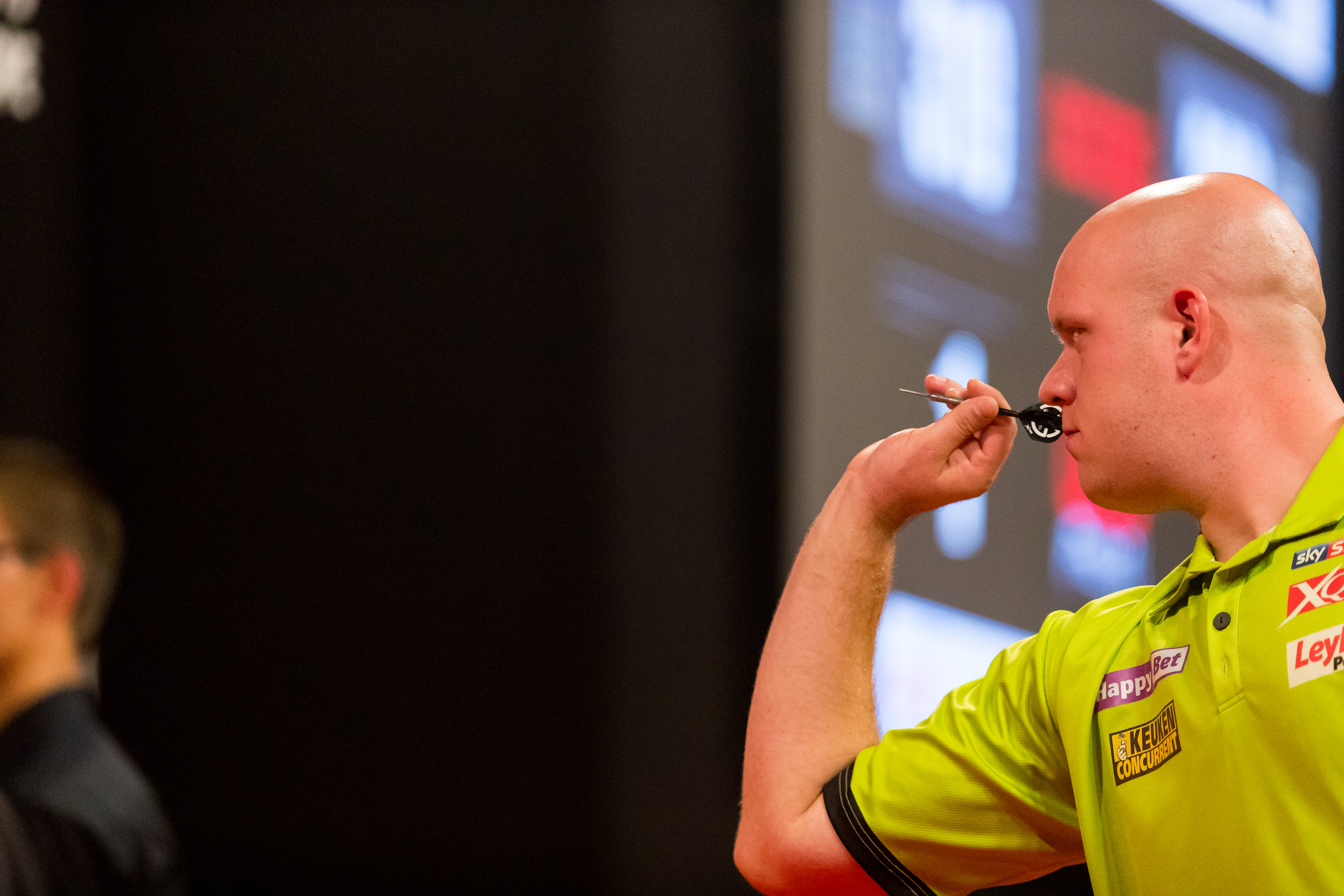 [9] Jelle Klaasen (NED) 1:6 [1] Michael van Gerwen (NED) during Professional Darts Corporation (PDC), German Darts Grand Prix (GDGP) at Maimarkthalle, Mannheim, Baden-Württemberg, Germany on 2017-09-10, Photo: Sven Mandel